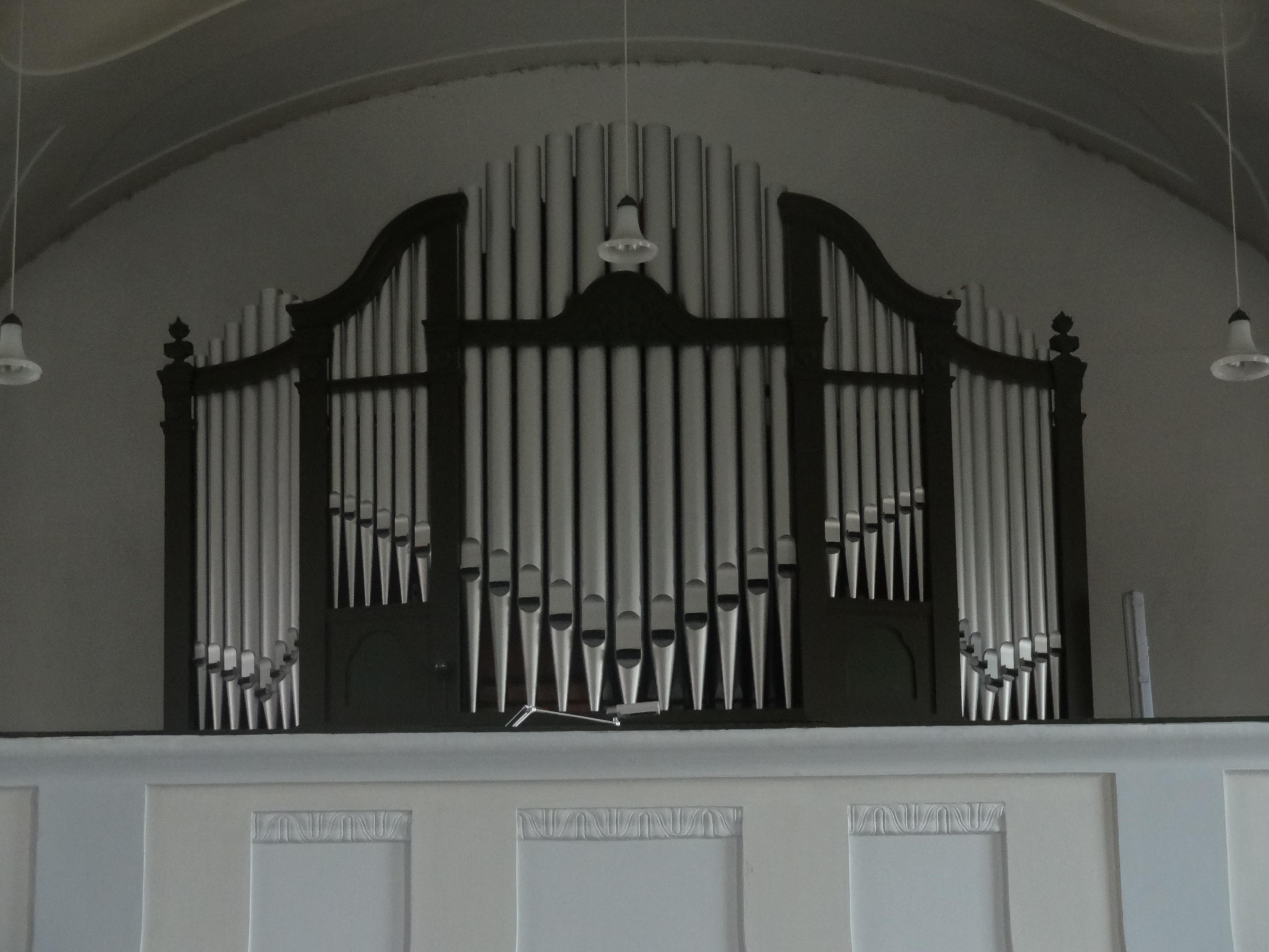 Orgel der Pfarrkirche Maria Immaculata in Dietelskirchen (Gde. Kröning, Lkr. Landshut)